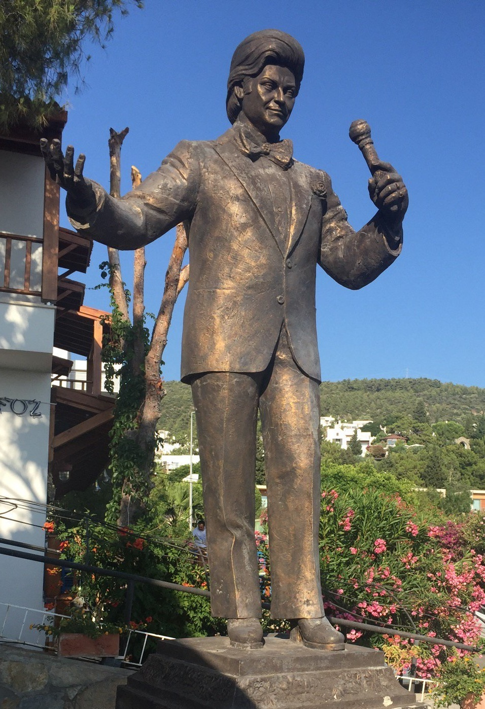 Zeki Müren büstü, Zeki Müren Sanat Müzesi, Bodrum.